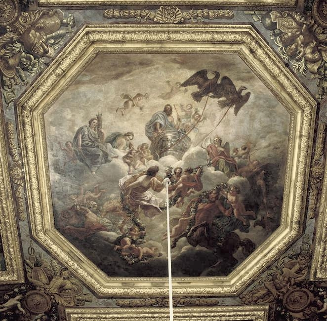 JUPITER ACCOMPAGNE DE LA JUSTICE ET DE LA PIETE ; Salon : Salle des gardes de la reine, Grands appartements du Château de Versailles Emplacement : plafond ; centre